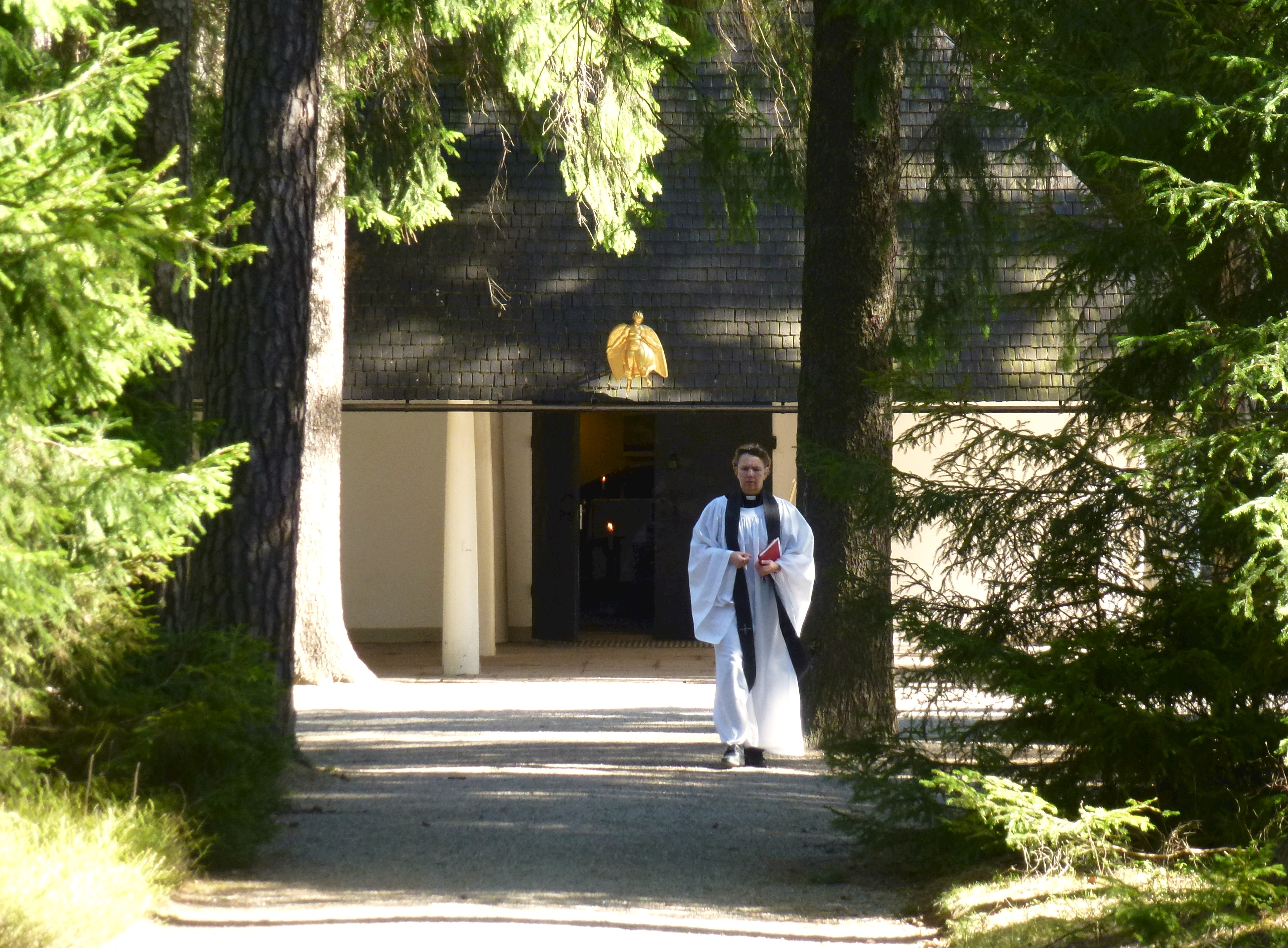 Skogskapellet och prästen